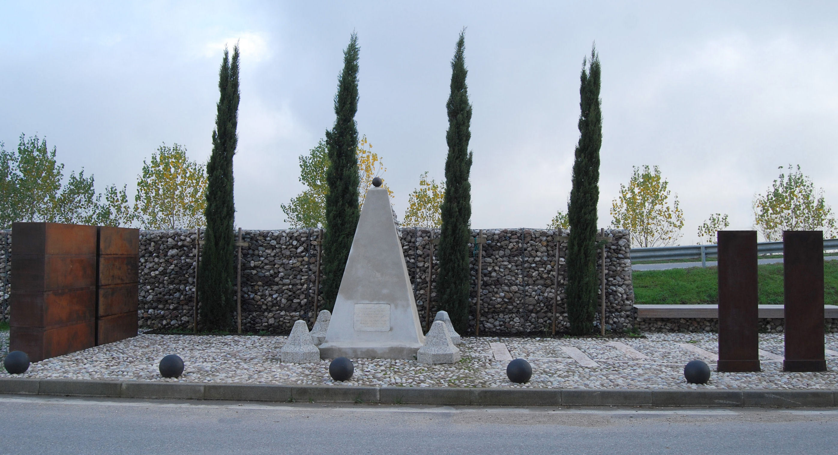 Medole, Ca' Morino. Cénotaphe à la mémoire du général Charles Auger, commandant de l'artillerie française, tué à la bataille de Medole